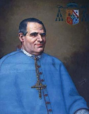 Retrato del obispo D. José Proceso Pozuelo y Herrero, natural de Pozoblanco (Córdoba, España). Óleo de 1887. Anónimo